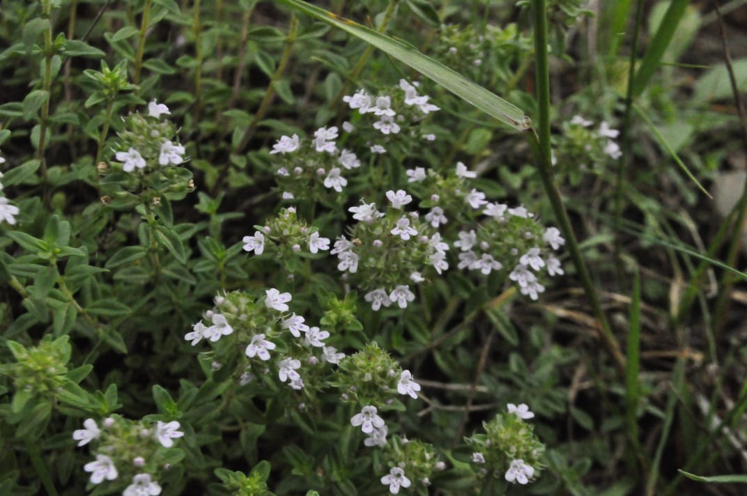 Соцветия тимьяна холмового. Кулинский район Дагестана.